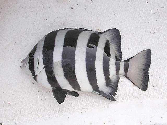 シマダイ(イシダイの幼魚, 神奈川県相模湾) Oplegnathus fasciatus (Sagami Bay, Kanagawa, JAPAN)